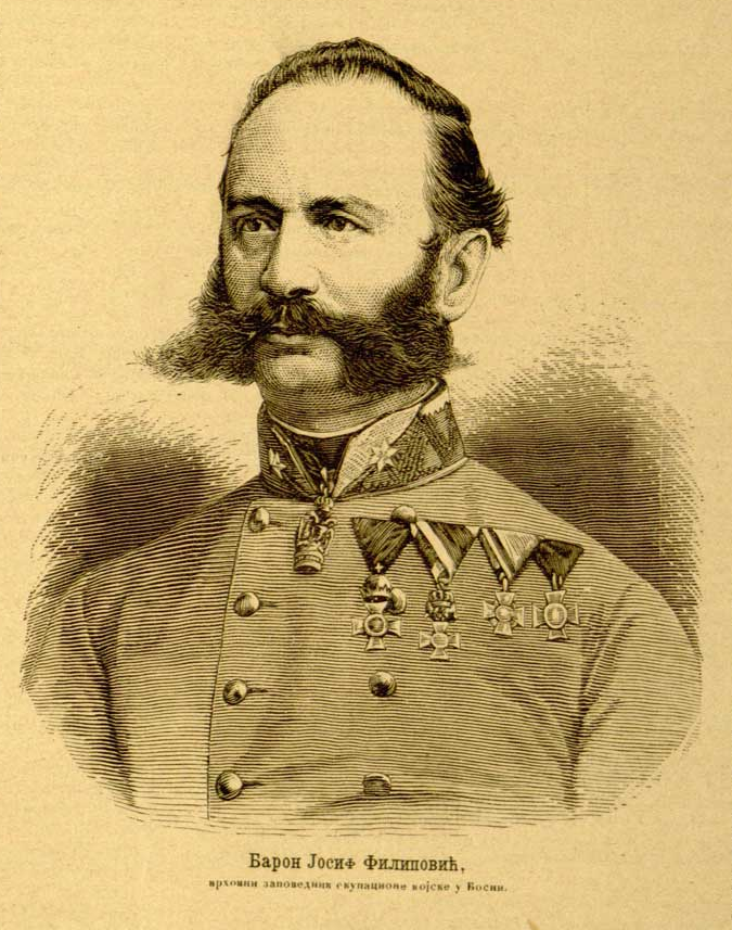 Der österreichische Baron Josip Filipović